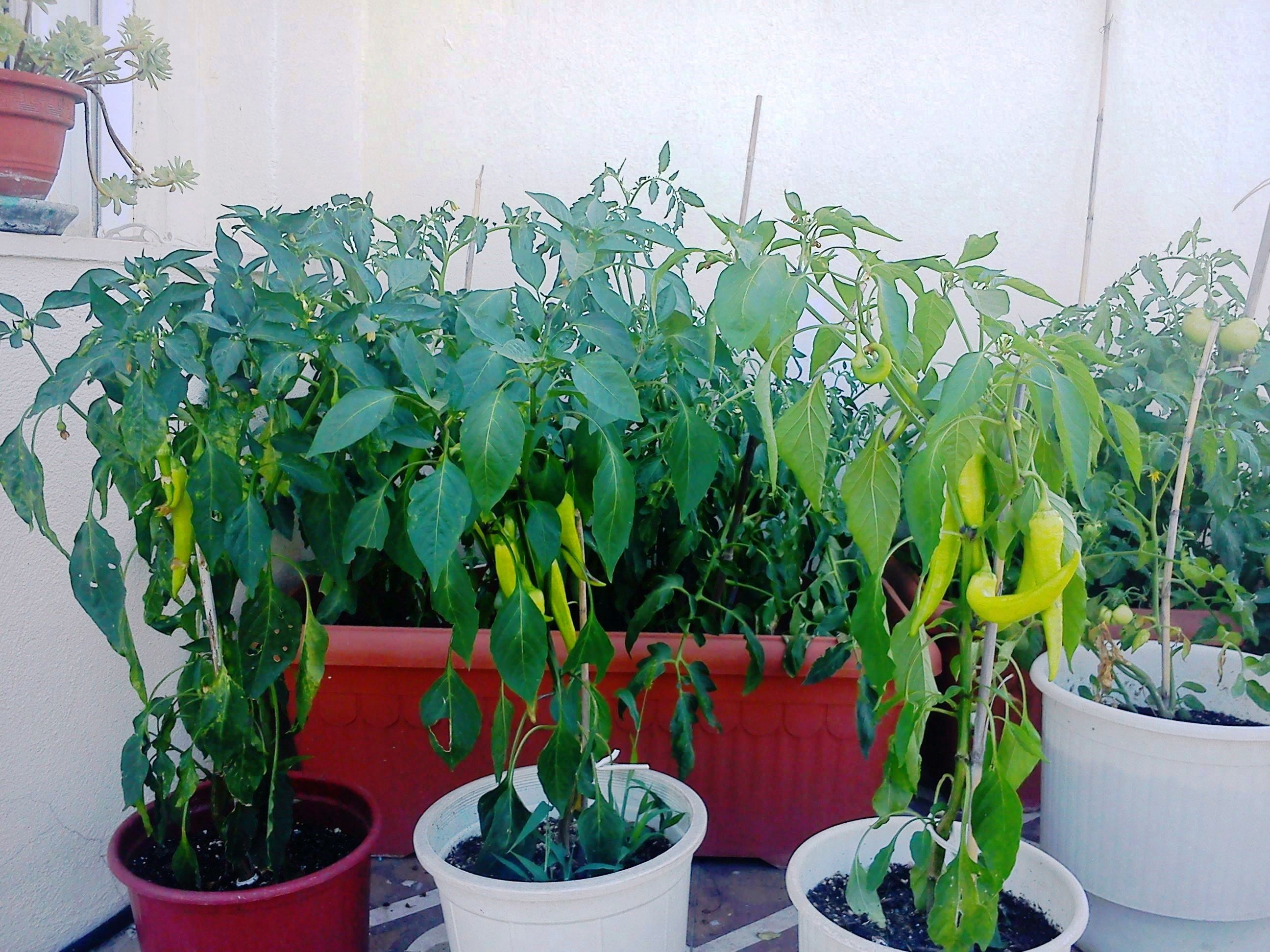 Vegetable growing on a balcony in Thessaloniki